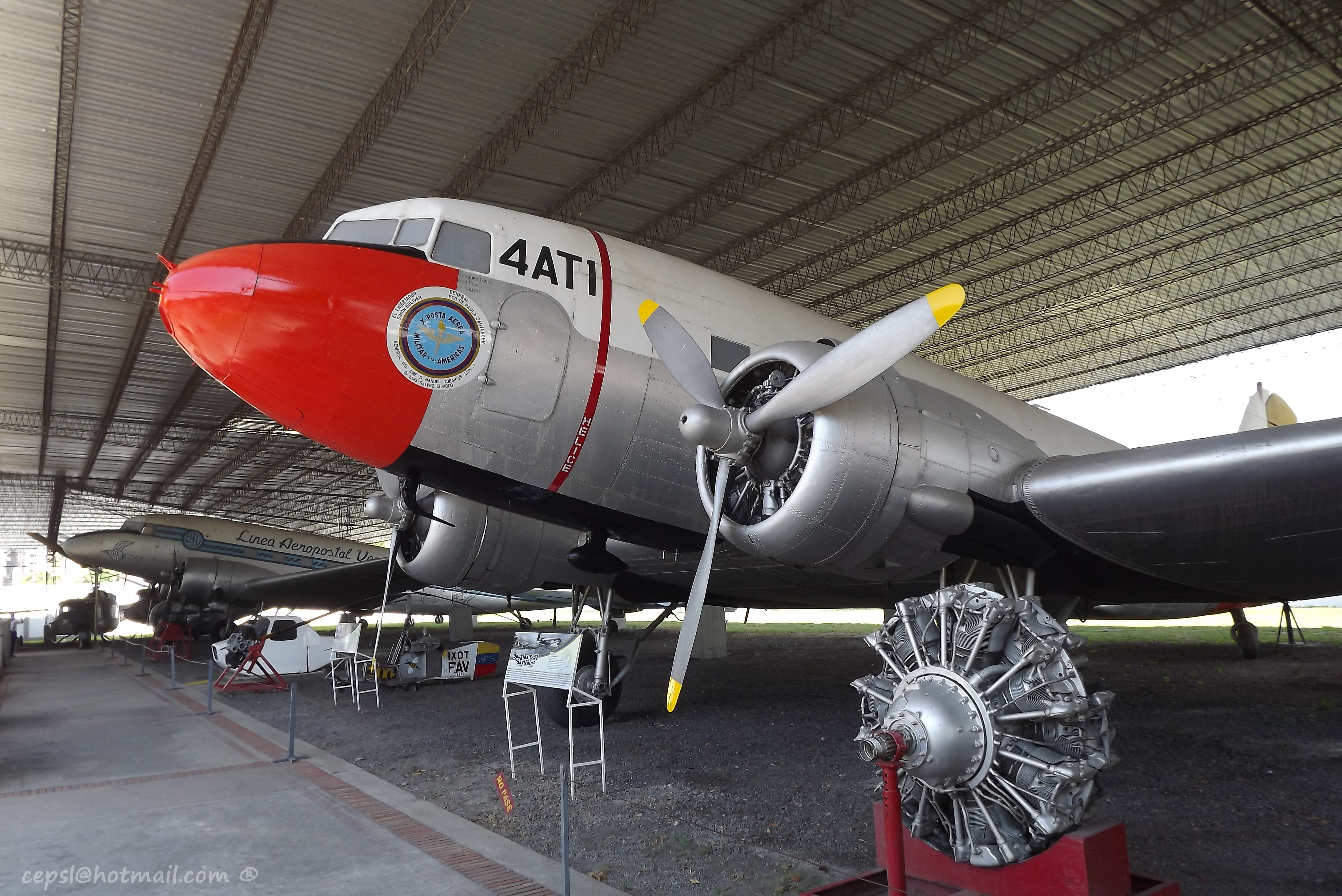 Douglas C-49Douglas (4AT1)